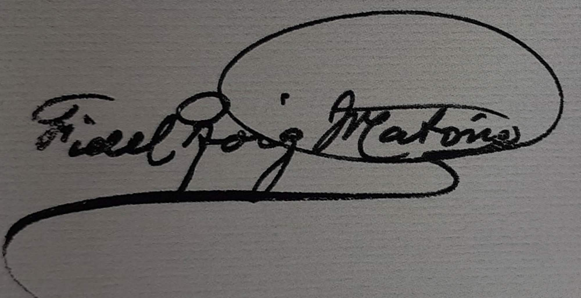 Firma de Fidel Roig Matóns